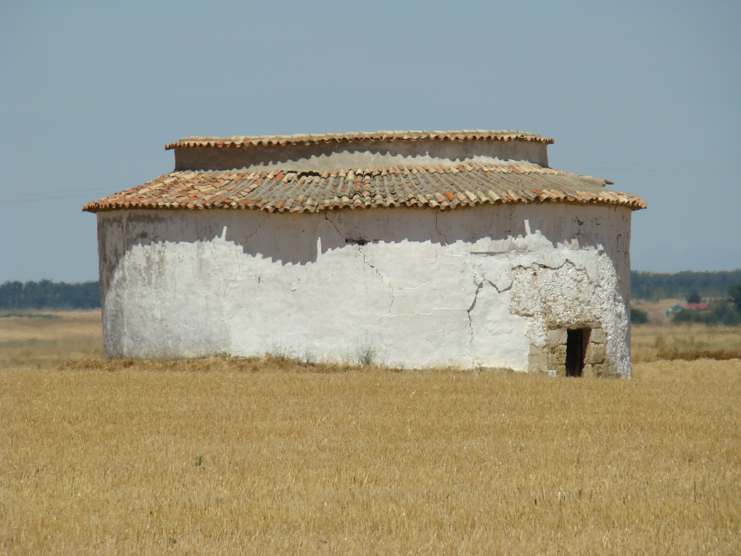 Montealegre de Campos en la provincia de Valladolid (España), en el verano del 2008. Un palomar en medio del campo.